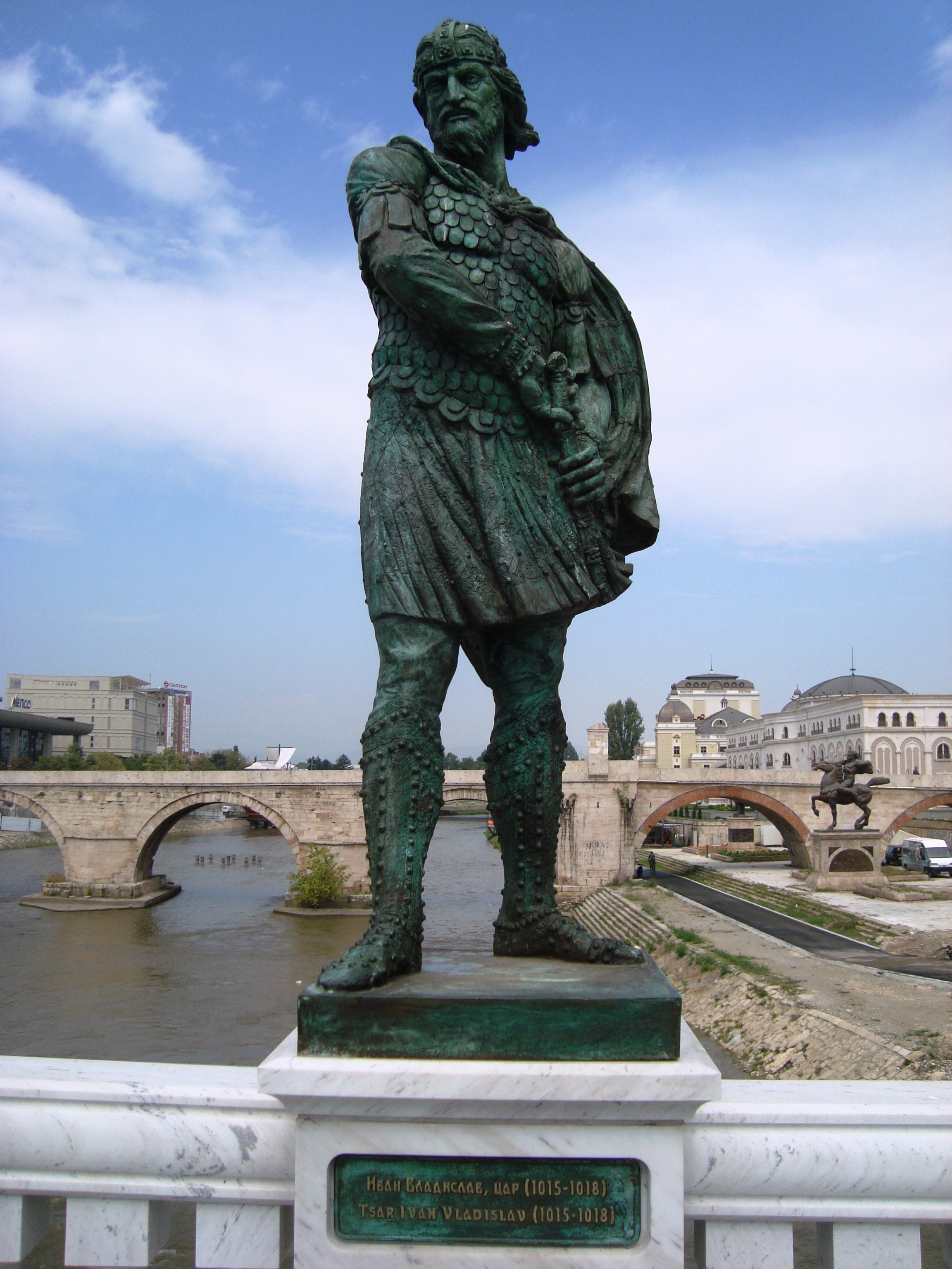 Statue of Ivan Vladislav Skopje, Macedonia